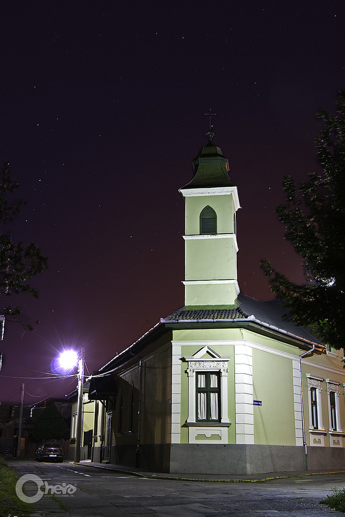 Biserica aflata pe str. Toplita si str. Spitalul Vechi. 2011.08 (fotografie prelucrata in photoshop, am eliminat cablurile care se aflau in fata cladirii)